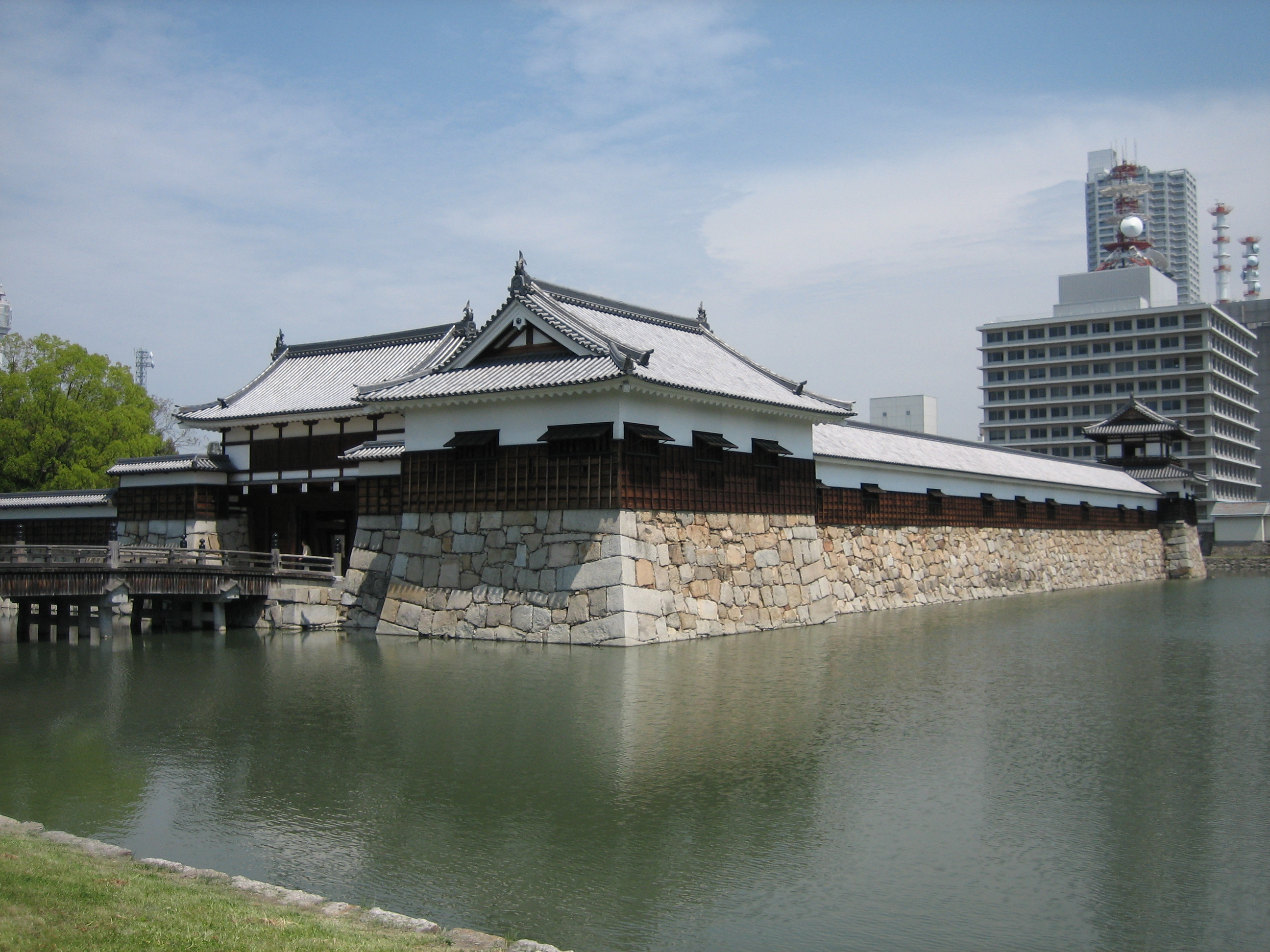 Nino-maru view